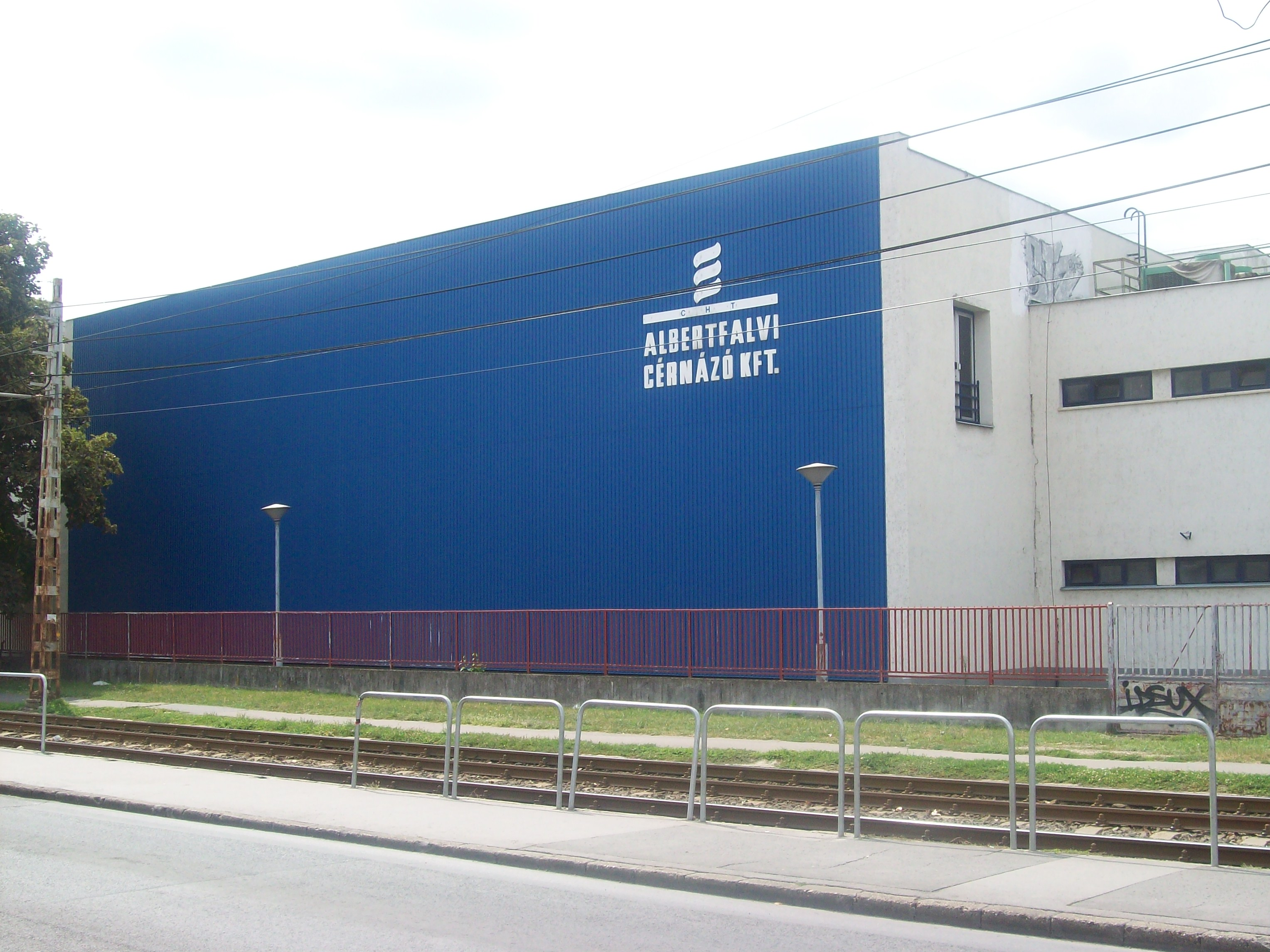 Az Albertfalvi Cérnázógyár épülete. - Budapest, XI. Fonyód utca 2